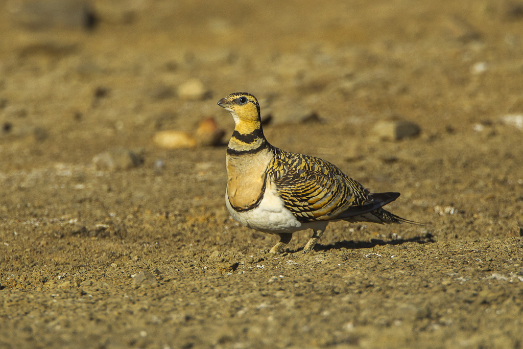 Pin-tailed Sandgrouse fem - Castuera - Estremadura_S4E6269